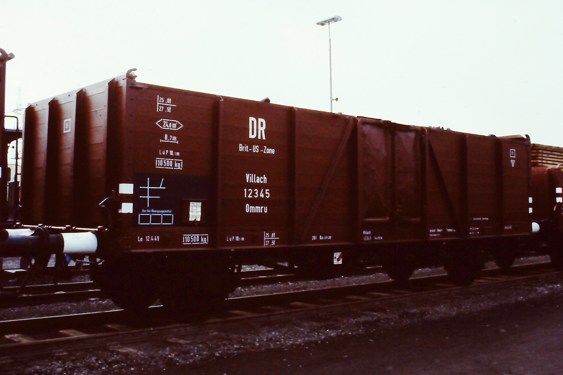 Offener Güterwaggon Ommru - Bauart Villach - ausgestellt auf der Ausstellung 150 Jahre Eisenbahn in Deutschland in Bochum-Dahlhausen